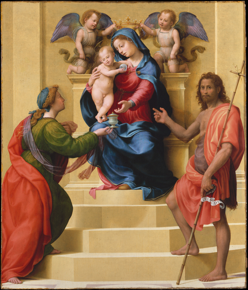 Virgen entronizada con niño y los santos María Magdalena y Juan Bautista